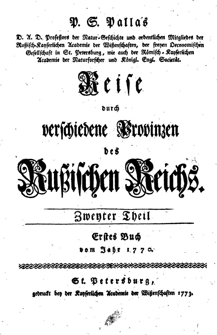 Page de titre de Reise durch verschiedene Provinzen des Rußischen Reichs